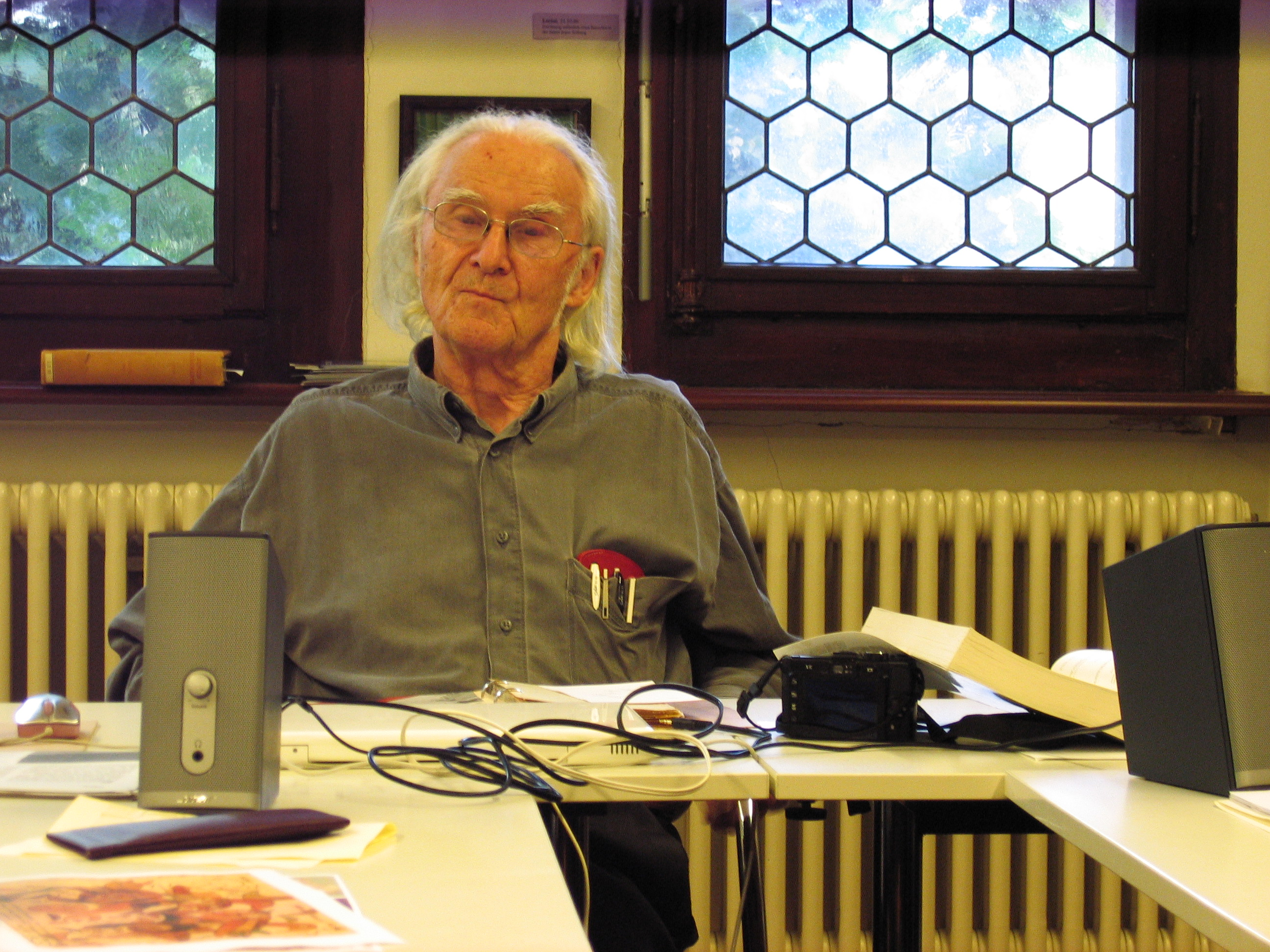 Fritz Senn während der Finnegans Wake-Lesegruppe der Züricher James Joyce Stiftung (Mai 2010)